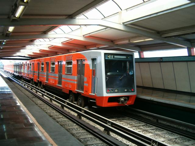 Estación Canal Del Norte Del Metro De La Ciudad De México.